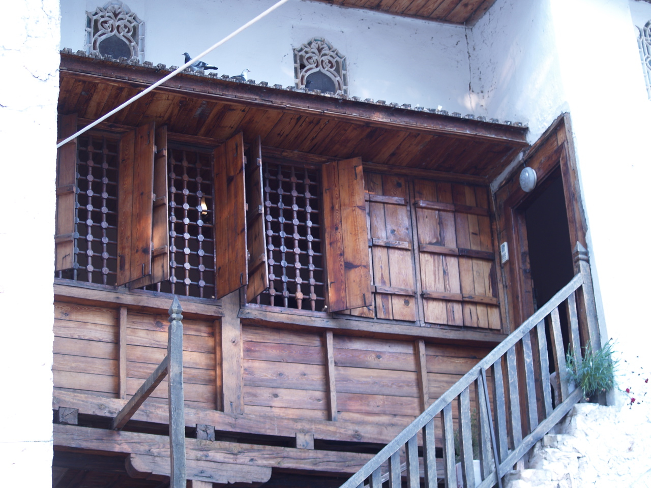 Ethnological Museum Kruje Albania